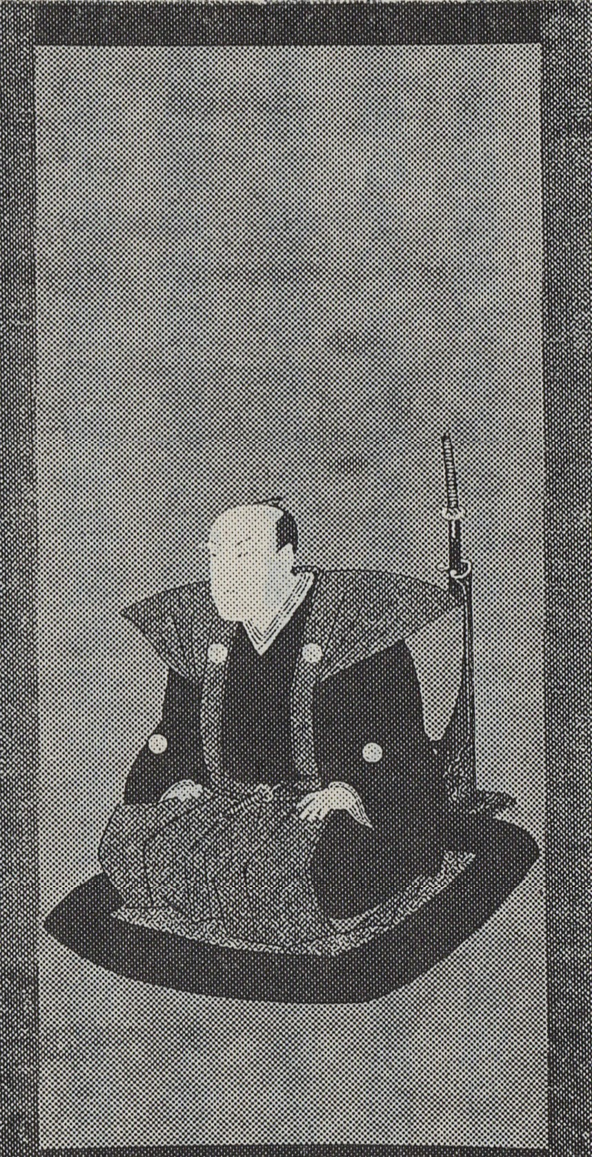 酒井忠器の肖像(モノクロ)。